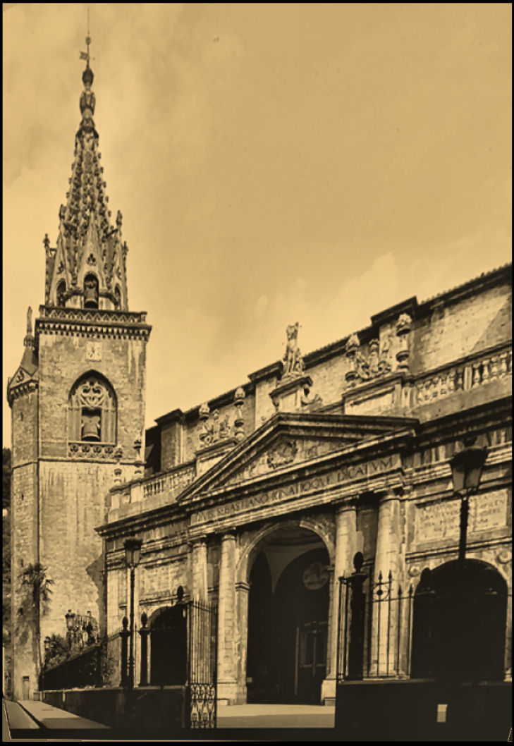 Fotografía de la iglesi parroquial matriz de Azpeitia